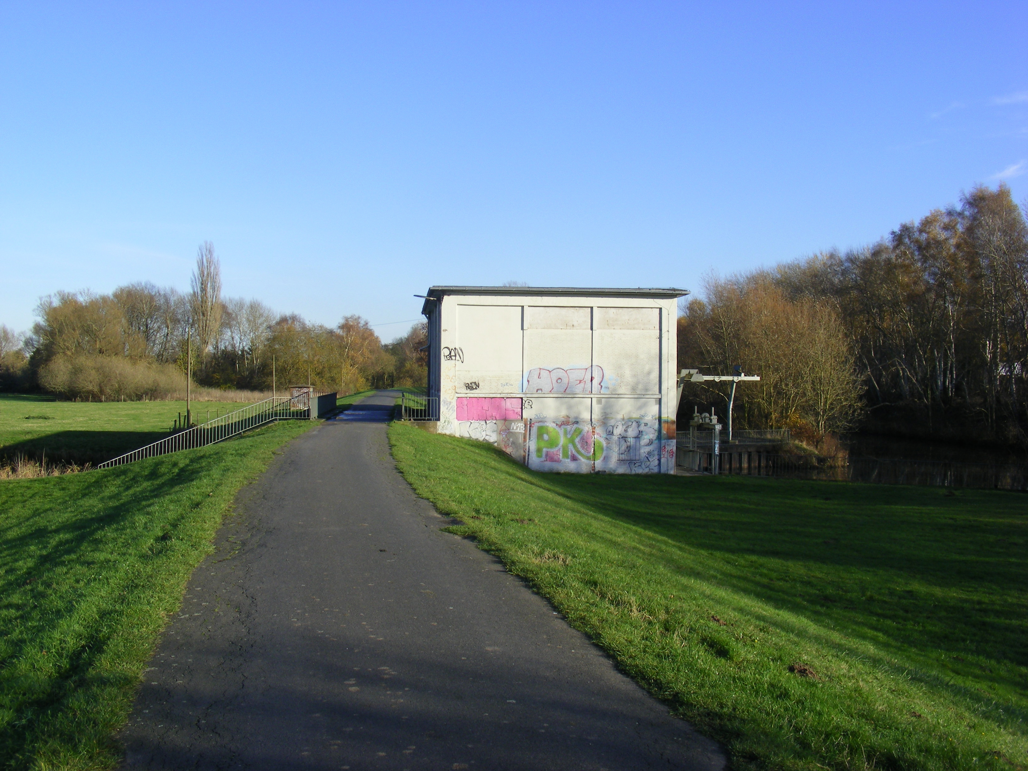 Schöpfwerk Huchting-Nord des Bremischen Deichverbandes am linken Weserufer im Verlauf des Huchtinger Fleets am Deich "Auf den Seelanden"